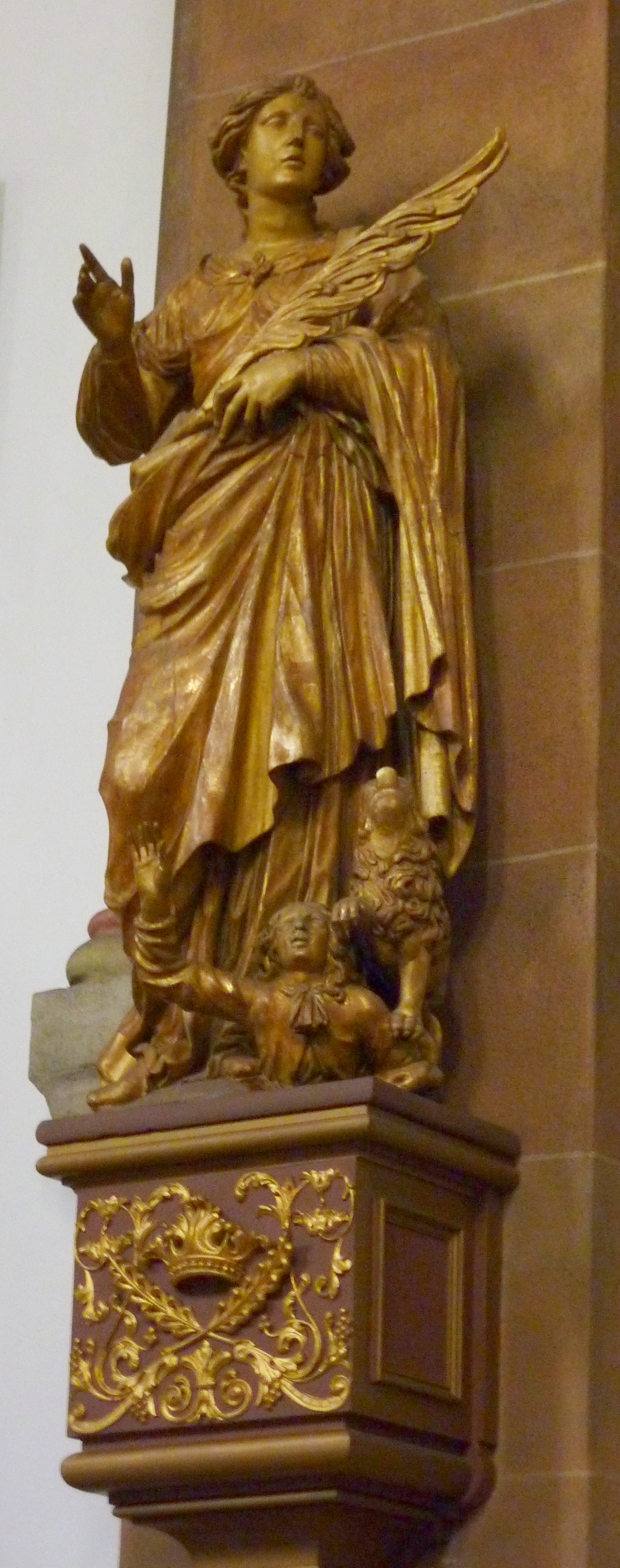 Statue der hl. Daria in der katholischen Pfarrkirche (Stiftskirche) St. Chrysanthus und Daria in Bad Münstereifel